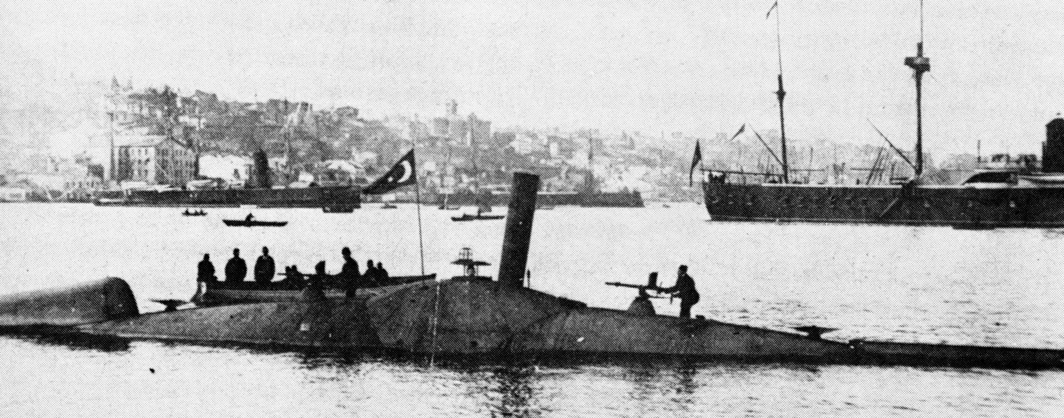 Nordenfelt class Turkish submarine Abdülhamid (1886)